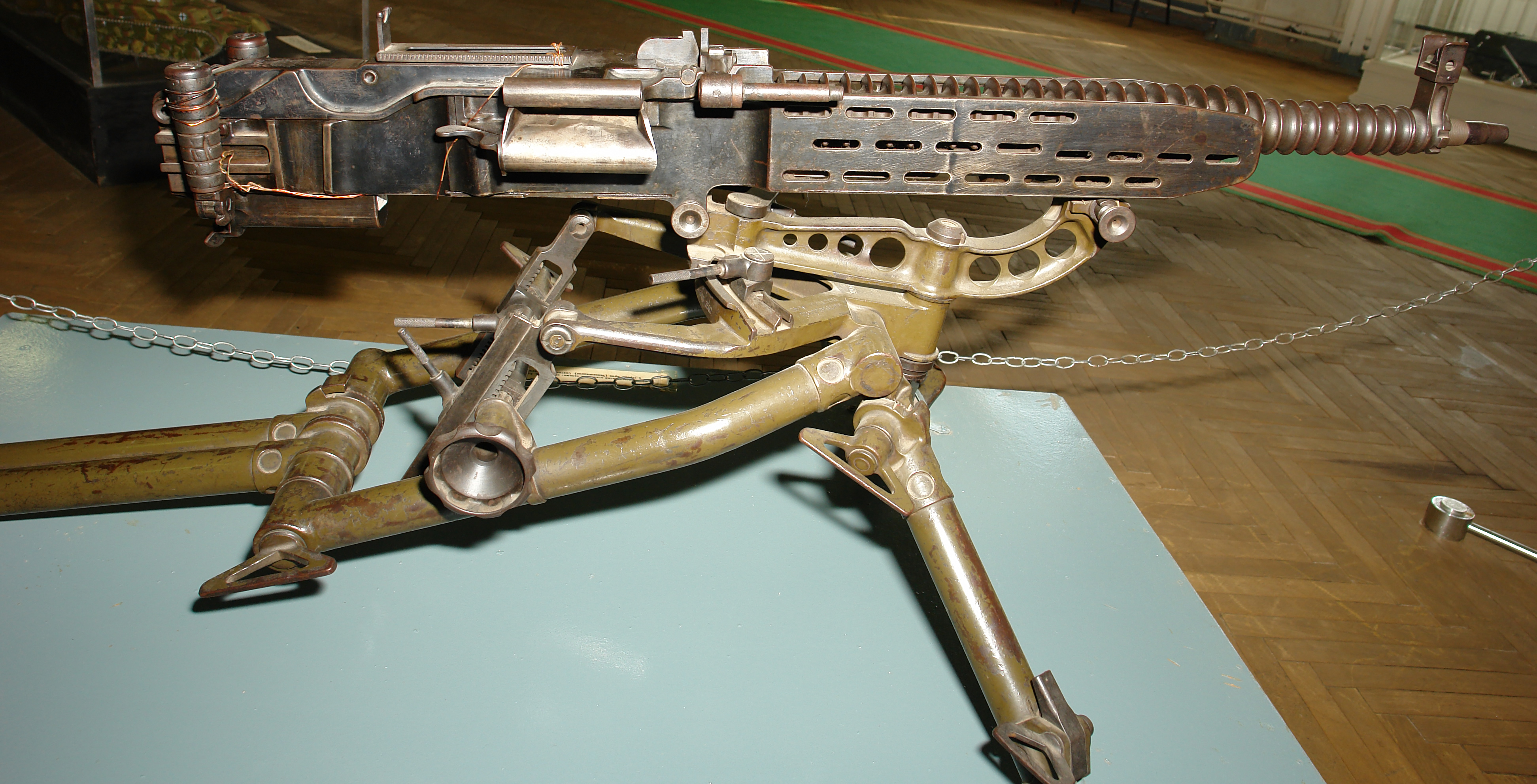 7,92-мм югославский станковый пулемет системы В. Холека обр. 1938/40 г. „Митральез М-40", изготовленный в городе Брно (Чехословакия). Состоял на вооружении Народно-освободительной армии Югославии. Военно-исторический музей артиллерии, инженерных войск и войск связи, Санкт-Петербруг.